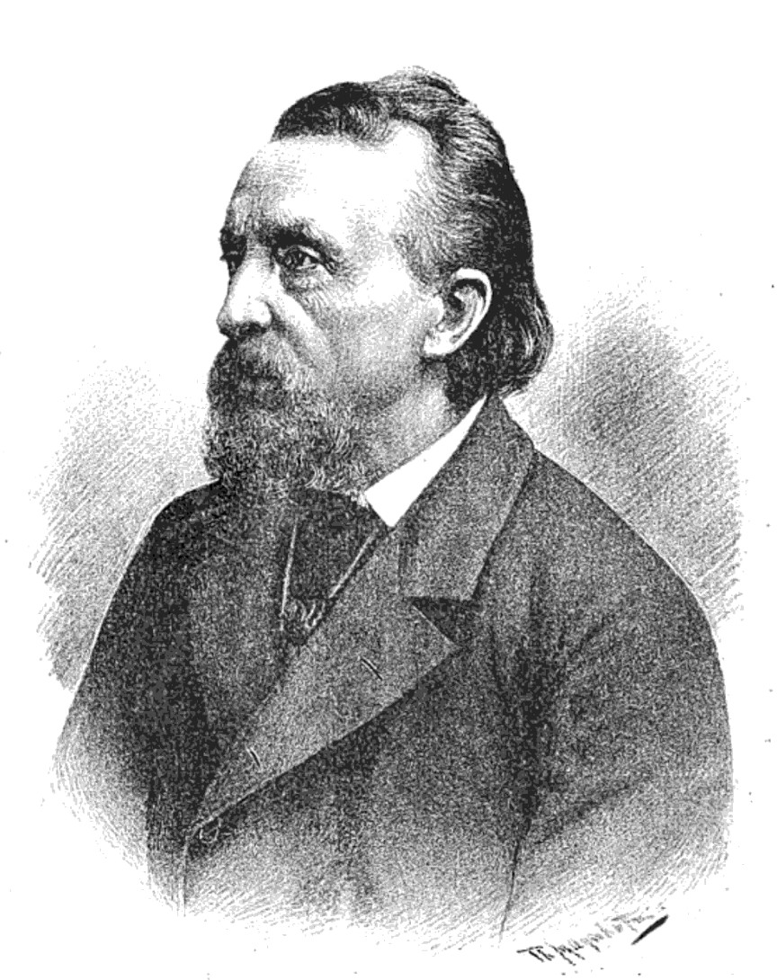 Josef Rank (1816 - 1896), Rakouský spisovatel a novinář narozený na Šumavě .